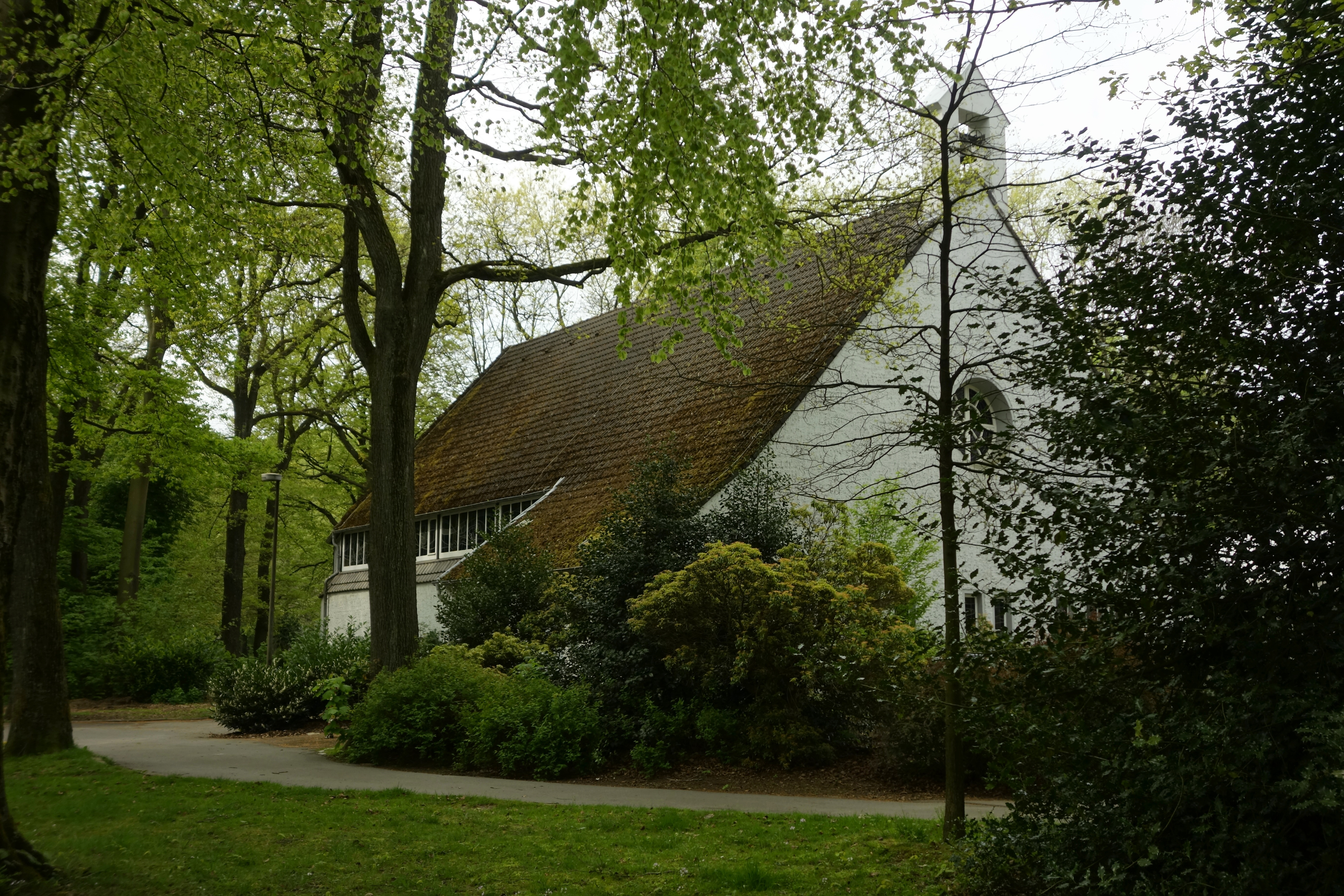 Die Johanneskirche liegt im Süden des Wuppertaler Stadtbezirks Elberfeld am Rande des von-der-Heydt-Parks, in der Nähe des Friedenshains. Als eine der 43 Notkirchen des Architekten Otto Bartning (1883–1959) wurde die Johanneskirche 1948/1949 nach dem Notkirchenprogramm des Evangelischen Hilfswerks für die von schweren Kriegsschäden betroffene Evangelisch-lutherische Gemeinde Elberfeld erbaut. Finanziert wurde der Bau hauptsächlich durch Spenden der amerikanischen Sektion des Lutherischen Weltbundes. Die Johanneskirche wurde am 17. April 1949 als erster Kirchenneubau Wuppertals nach dem Zweiten Weltkrieg eingeweiht. Signifikantes Merkmal ihrer reduktionistischen Architektur ist die (von außen nicht sichtbare) zeltartige Dreigelenkbinderkonstruktion aus Holz und ein vorwiegend aus Trümmersteinen errichtetes, außen verputztes Mauerwerk. Der Grundriss entspricht dem Typ B des Notkirchenprogramms mit 5/10-Chorschluss. Die Bedeutung Bartnings liegt unbestritten in seinem Beitrag zur Entwicklung des modernen protestantischen Kirchenbaus. Bartning sah den Kirchenbau als klar umrissene Bauaufgabe an und hat sich sowohl mit dessen räumlicher Gestaltung als auch mit der Problematik von Technik und Materialien theoretisch und praktisch auseinandergesetzt. Erhaltung und Nutzung liegen daher gemäß § 2 (1) DSchG aus städtebaulichen, wissenschaftlichen und stadthistorischen Gründen im öffentlichen Interesse. Die Unterschutzstellung erstreckt sich auf das gesamte Gebäude.This is a photograph of an architectural monument.